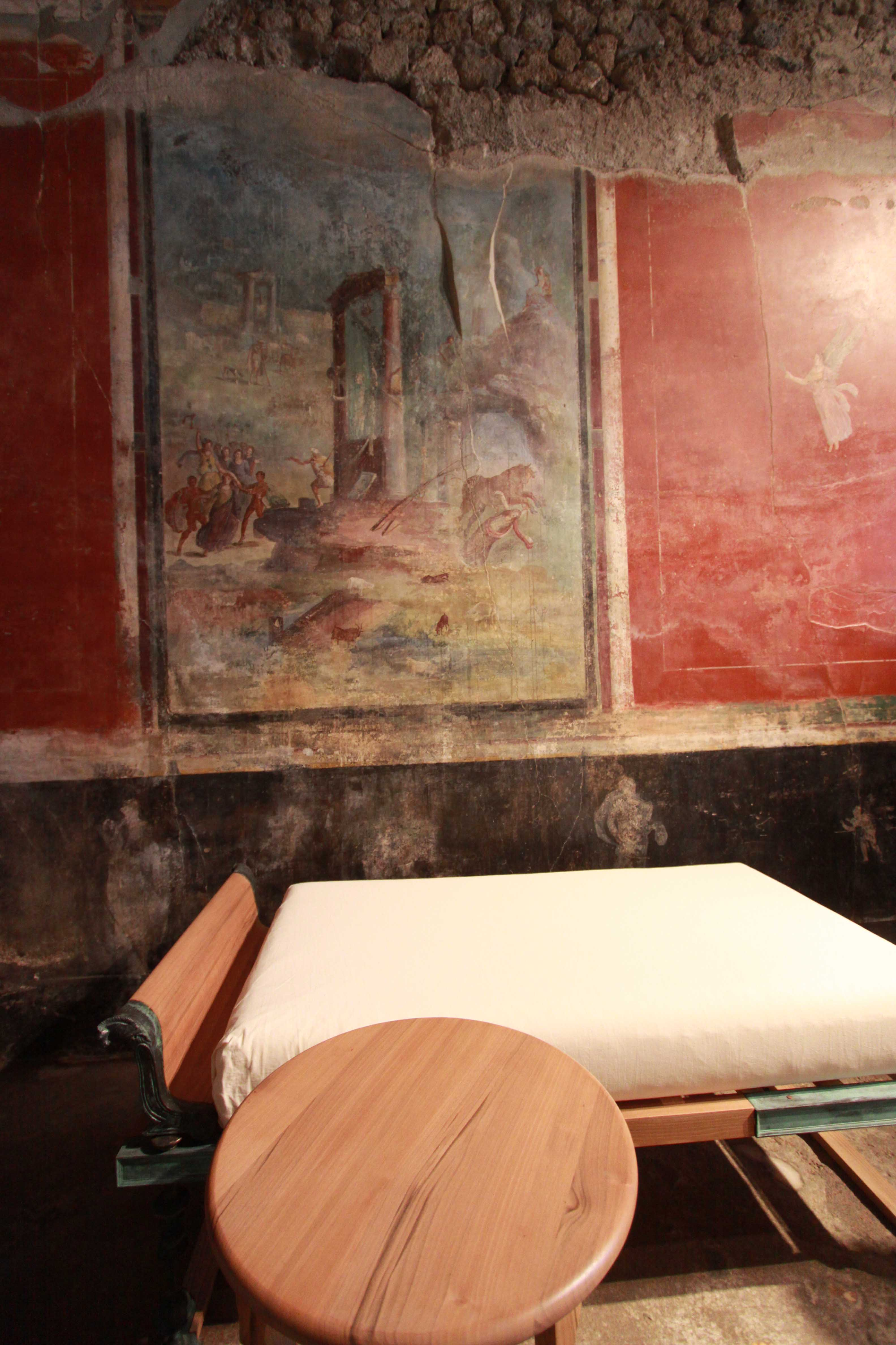 La domus di Iulius Polibius un riccco Panettieri la sua casa ritrovata e aperta in occasione della settimana della cultura nella foto la ricostruzione in un ologramma la ragazza seduta in stato di attesa gli ultimi momentio prima dell' Eruzione del Vesuvio This is a photo of a monument which is part of cultural heritage of Italy.